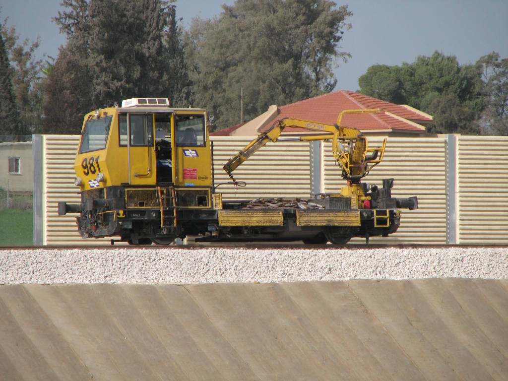 קרונית מנוף 981 של רכבת ישראל מתוצרת Geismar